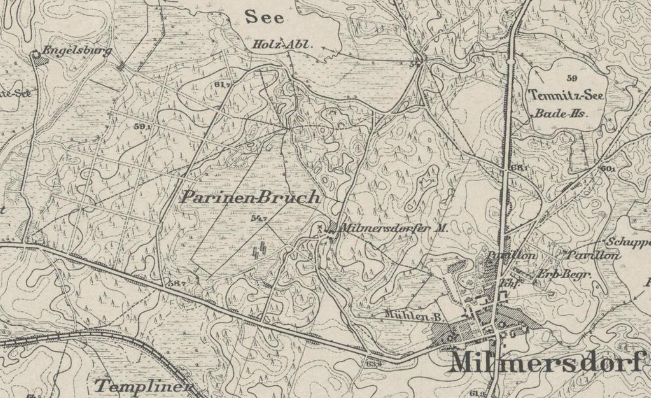 Milmersdorf, Milmersdorfer Mühle und Engelsburg, Gem. Milmersdorf, Lkr. Uckermark, Brandenburg, Ausschnitt aus der Topographischen Karte 1:25.000 Blatt Br. 2847 Templin von 1882/84 mit einzelnen Nachträgen von 1911